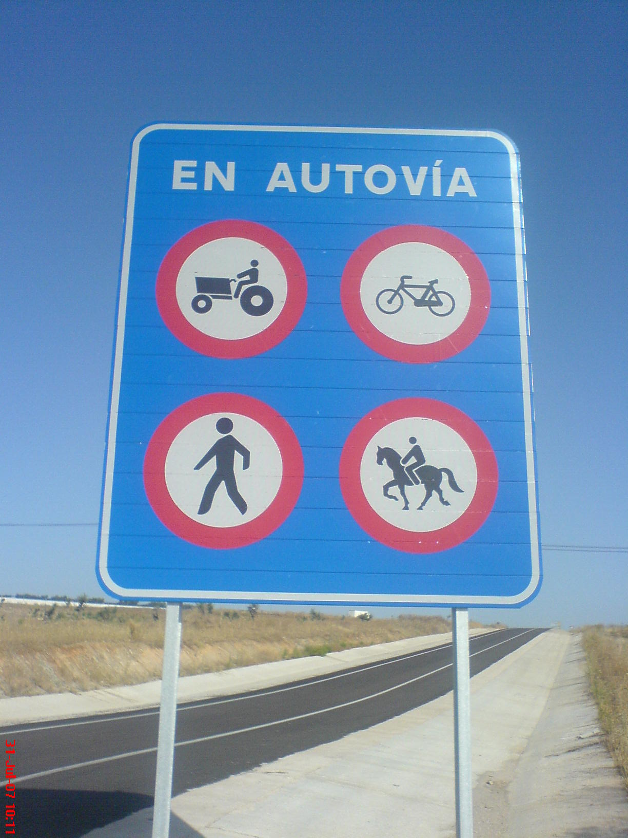 Cartel de entrada autovía. Tráficos prohibidos.